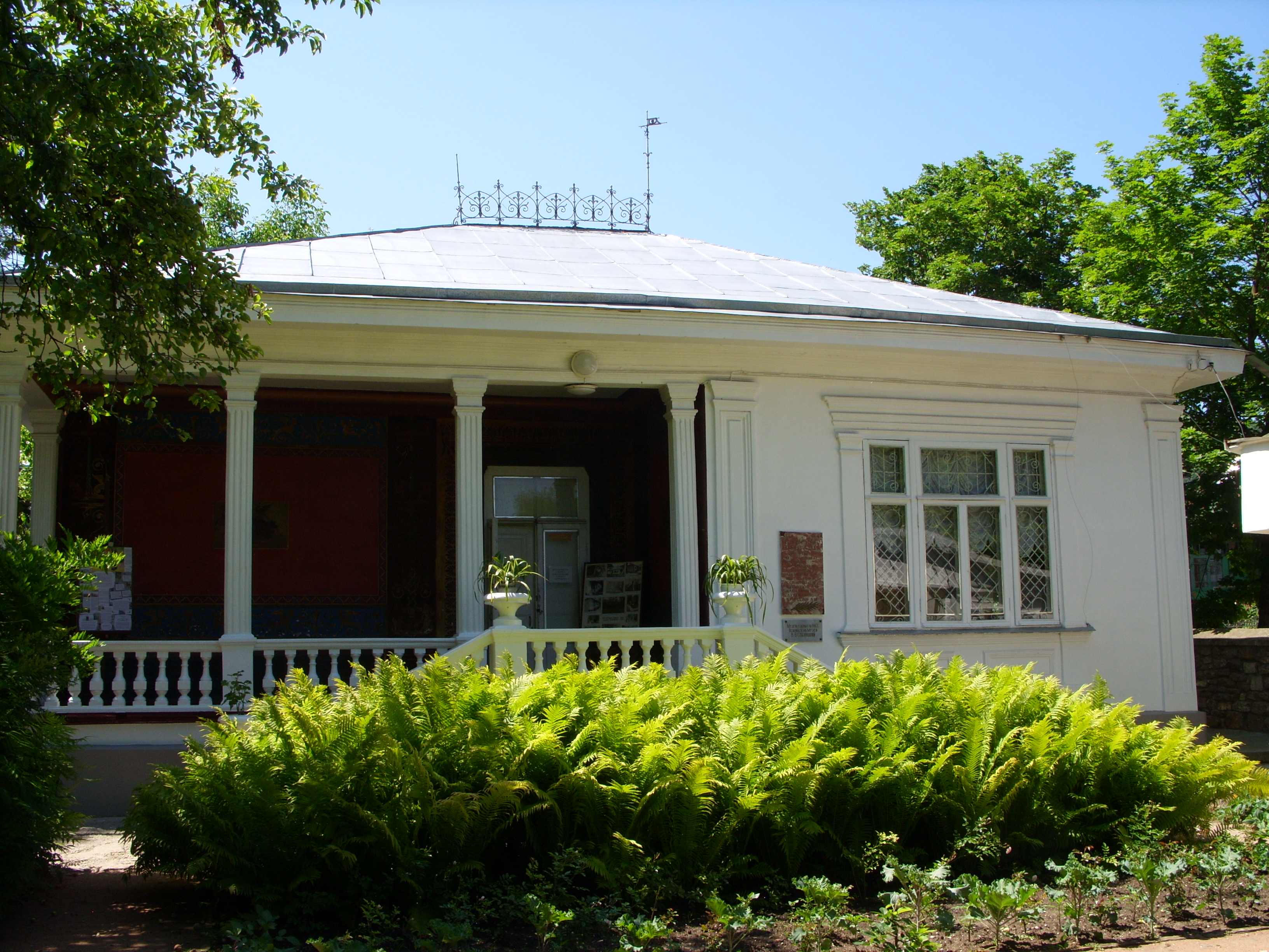 Мемориальный музей-усадьба художника Н. А. Ярошенко, г. Кисловодск. Неофициальное краткое название - «белая вилла».